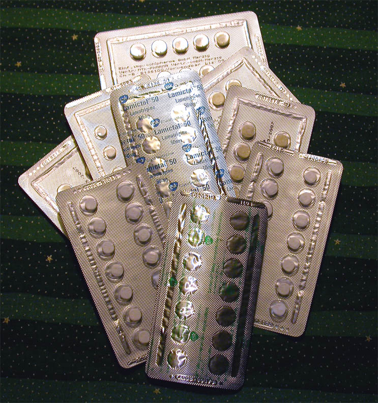 Lamictal-Tabletten Oben-rechts: Hierzu gehört die blaue Rückseite (10er Blister mit jeweils 50mg, ohne Geschmacksstoff, gelb) Links unter der blauen Rückseite: 10er Blister mit jeweils 25mg, mit Geschmacksstoff, weis Unten-links: Hierzu gehört die grüne Rückseite (14er Blister mit jeweils 50mg, mit Geschmacksstoff, weis)